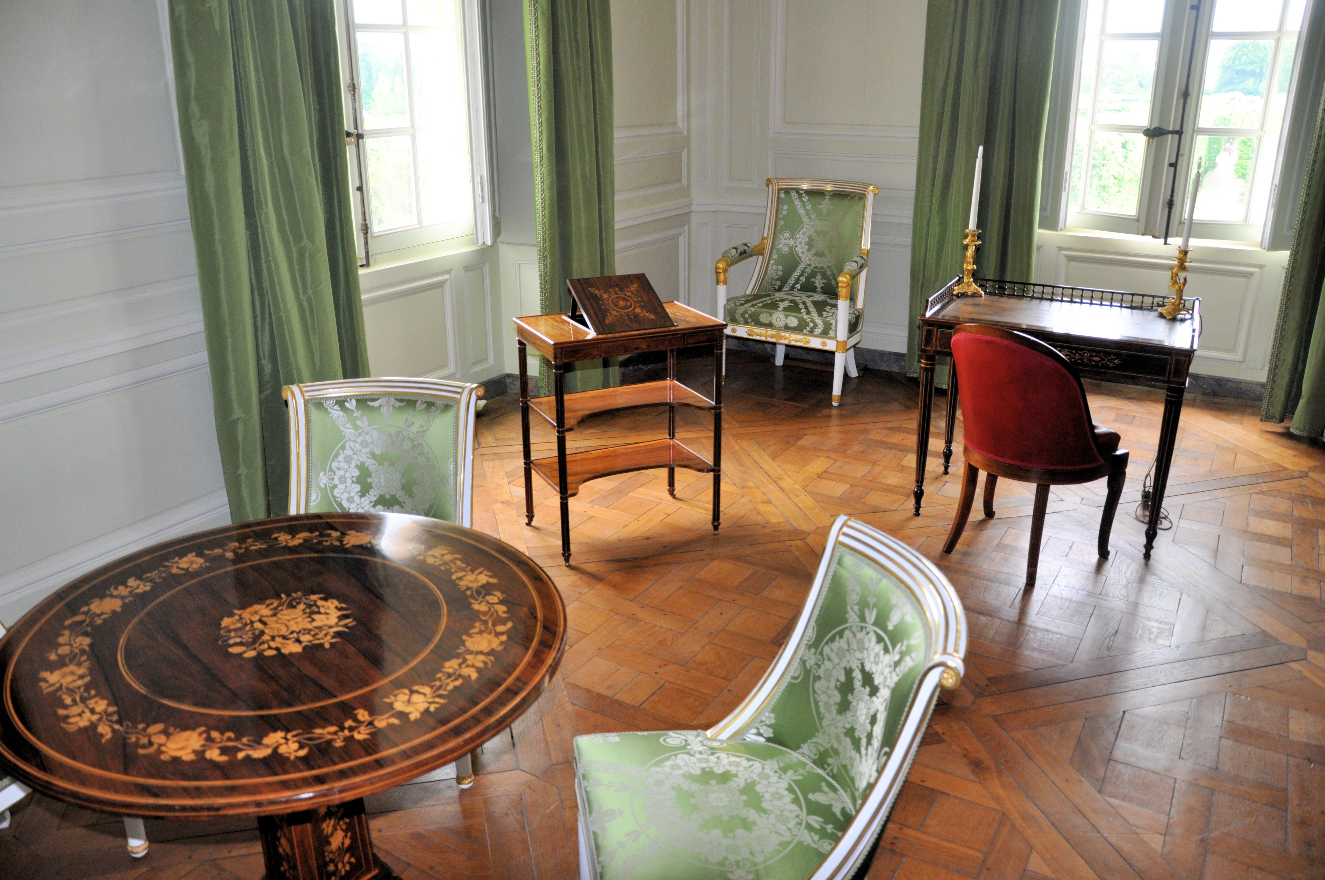 Petit Trianon - Attique - Salle évoquant le boudoir de la duchesse d'Orléans